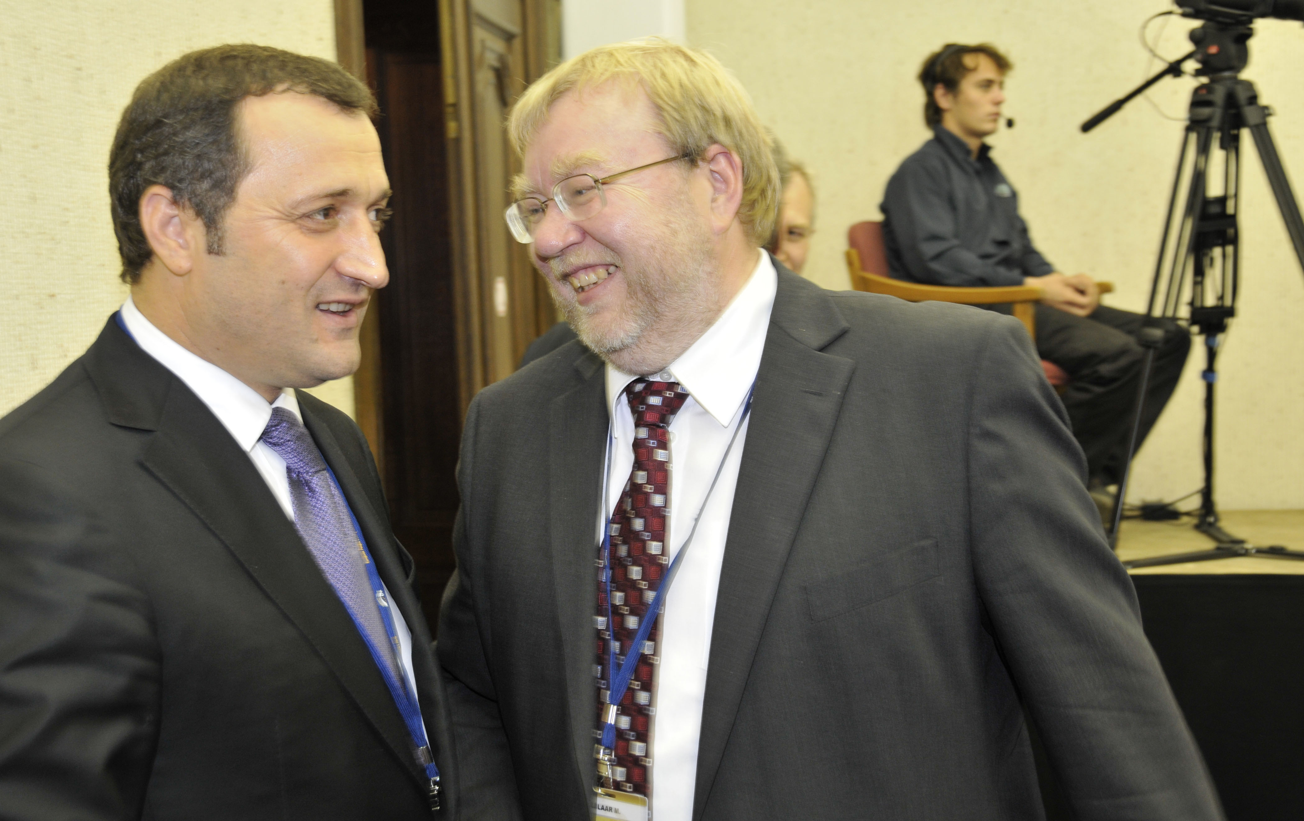 EPP Summit September 2010